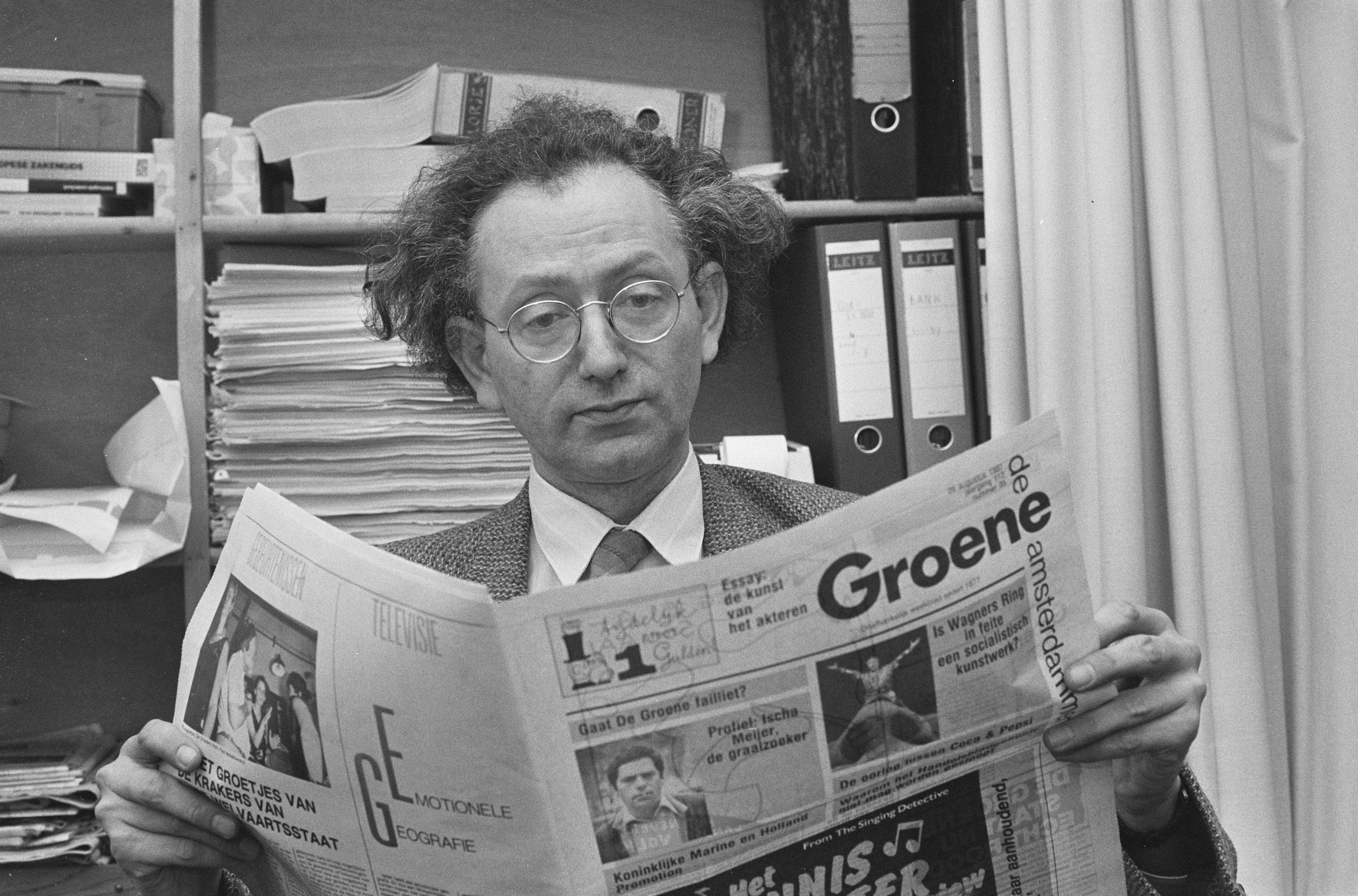 Collectie / Archief : Fotocollectie Anefo Reportage / Serie : [ onbekend ] Beschrijving : Problemen bij opinieweekblad "De Groene Amsterdammer" ; hoofdredacteur Martin van Amerongen met zijn krant Datum : 26 augustus 1987 Trefwoorden : kranten, redacteuren Fotograaf : Molendijk, Bart / Anefo Auteursrechthebbende : Nationaal Archief Materiaalsoort : Negatief (zwart/wit) Nummer archiefinventaris : bekijk toegang 2.24.01.05 Bestanddeelnummer : 934-0601